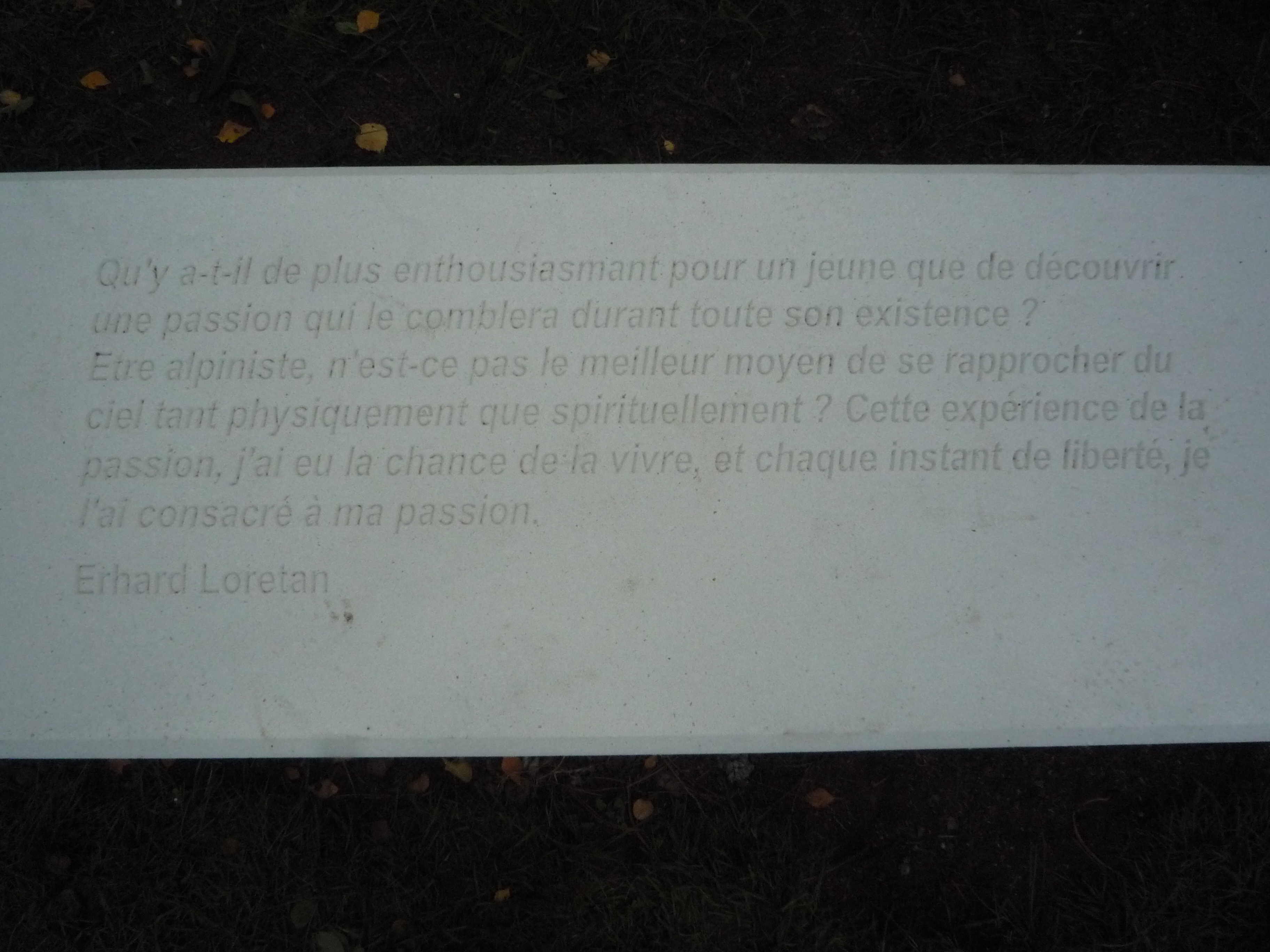 Cette citation se trouve au parc Erhard Loretan, à Bulle, en hommage à l'alpiniste.